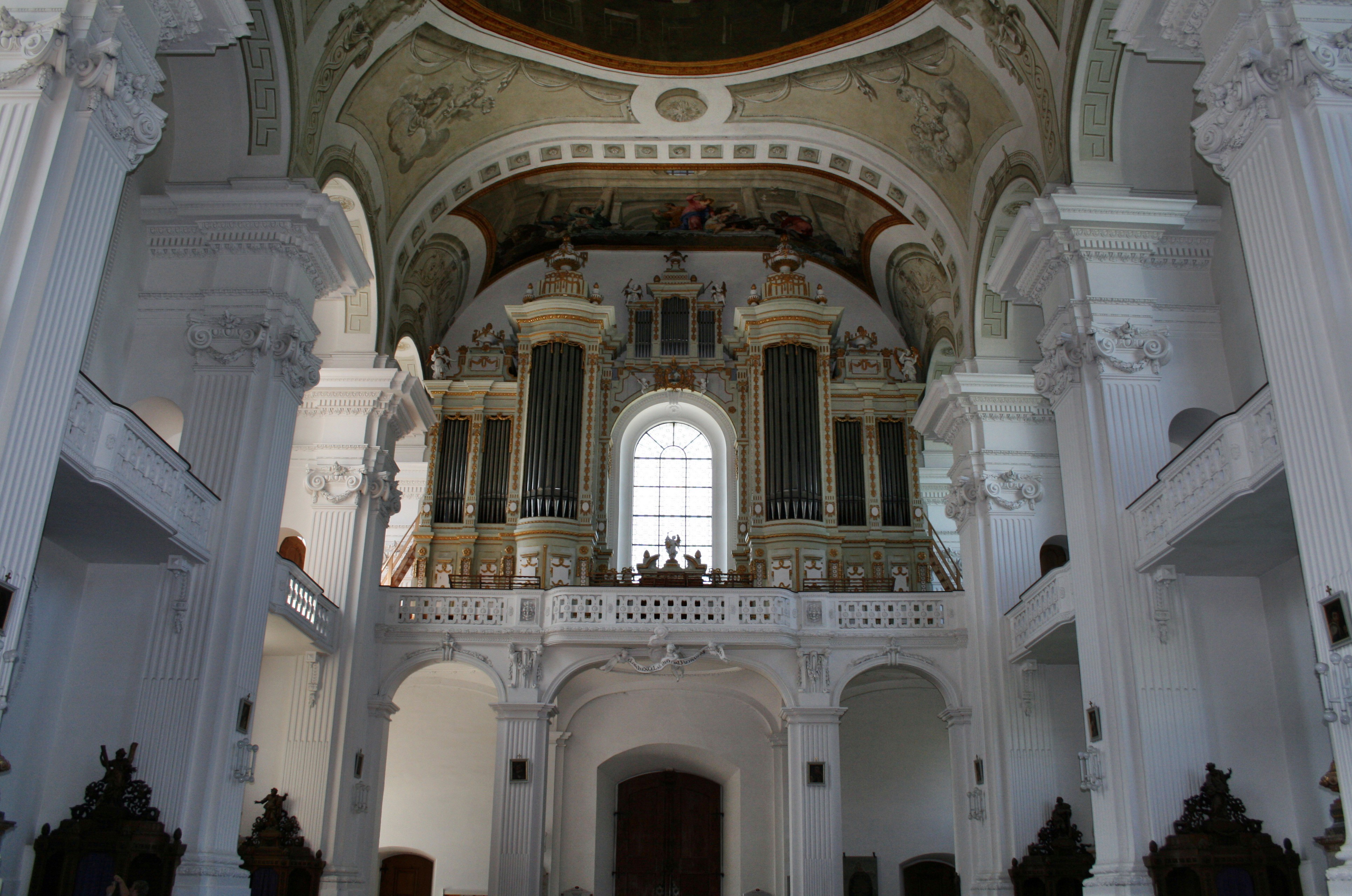 St Verena, Rot an der Rot